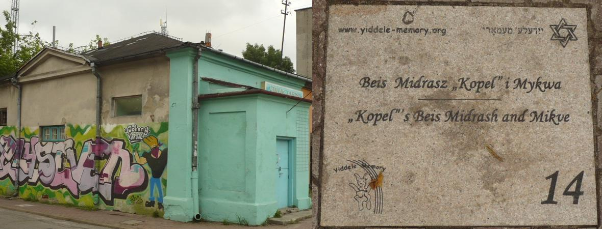 Radomsko. Otwarte Muzeum Żydowskie 14